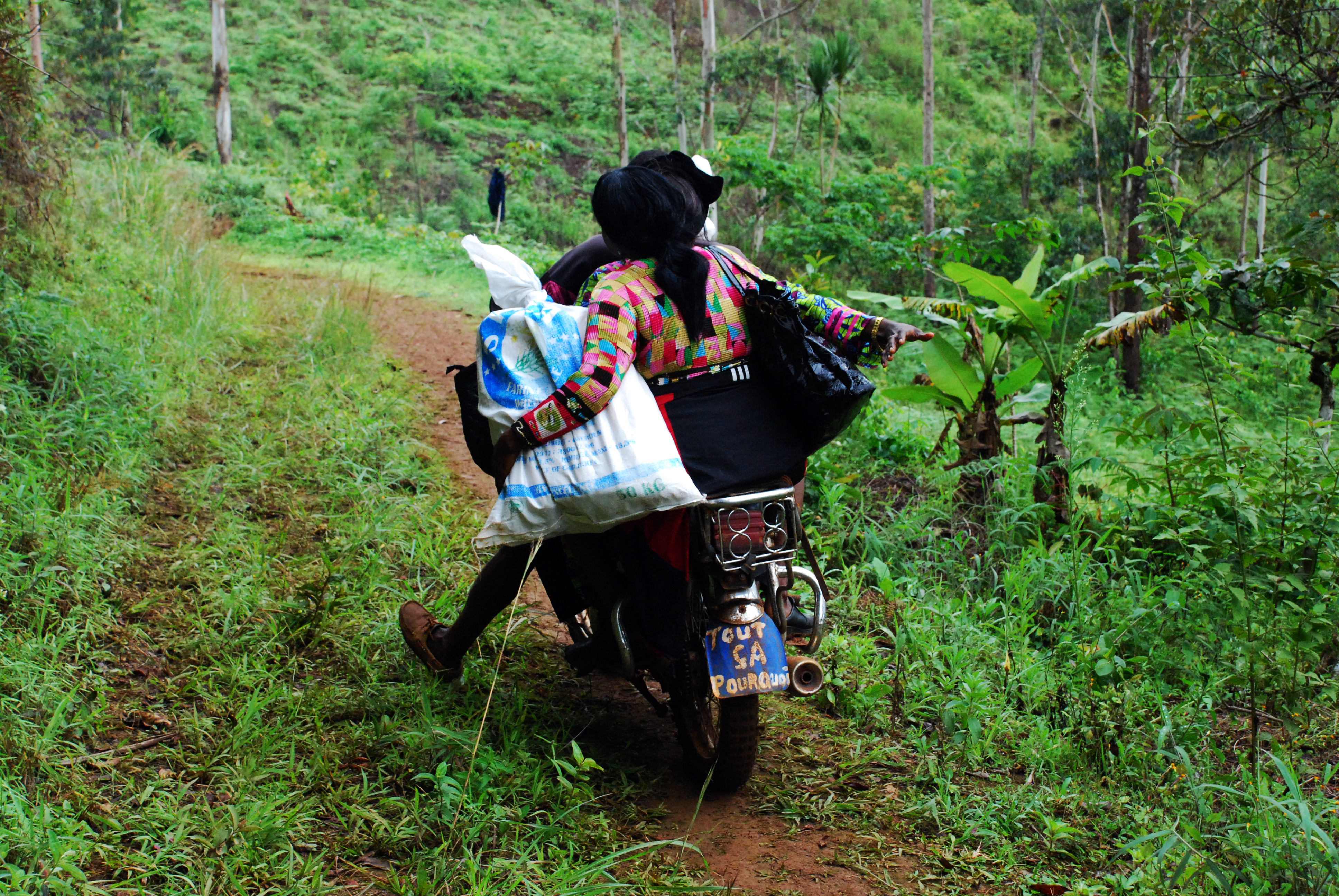 Une moto taxi transportant une cliente dans les routes de village à Bafang au Cameroun.